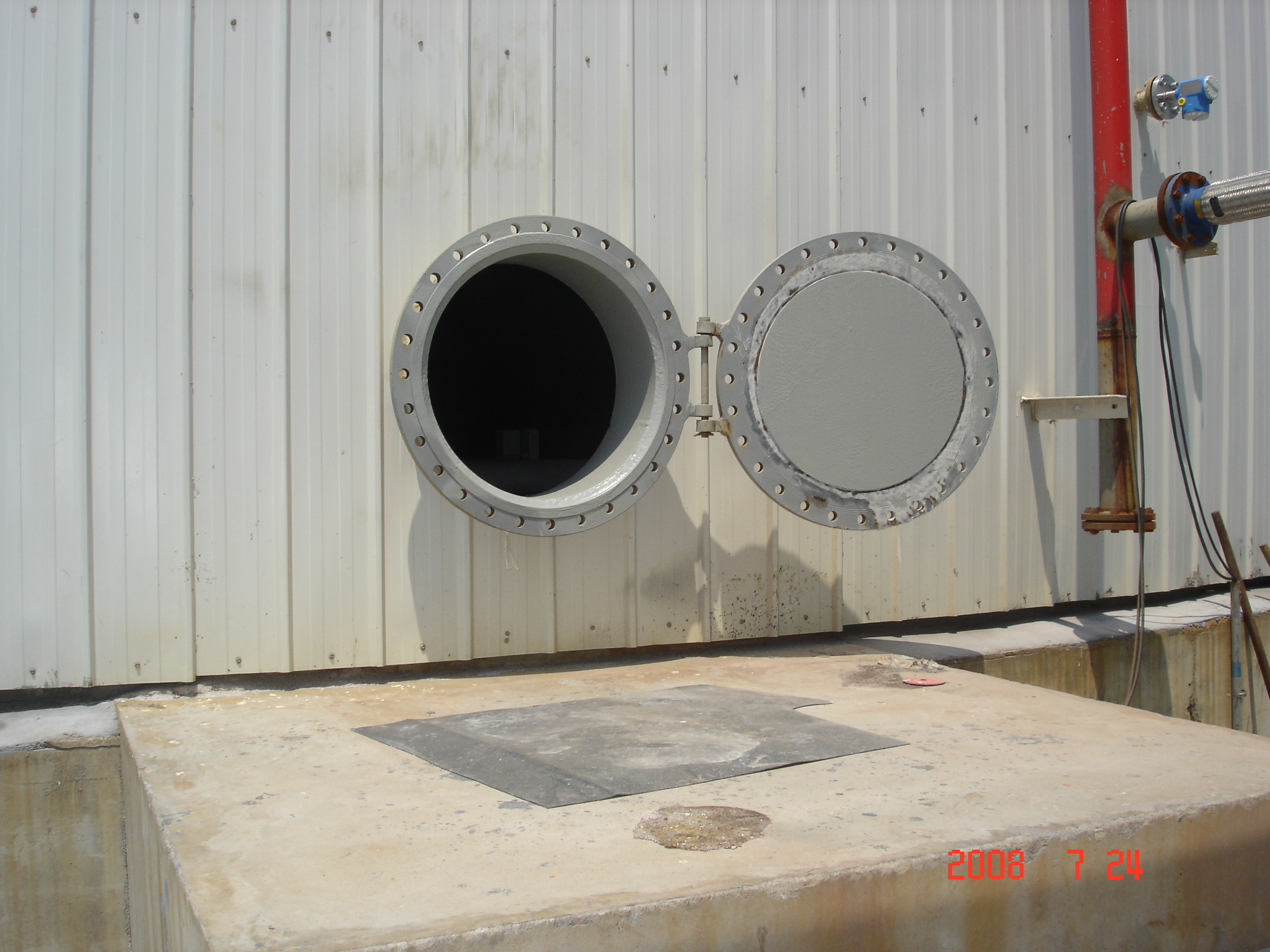 储油罐人孔